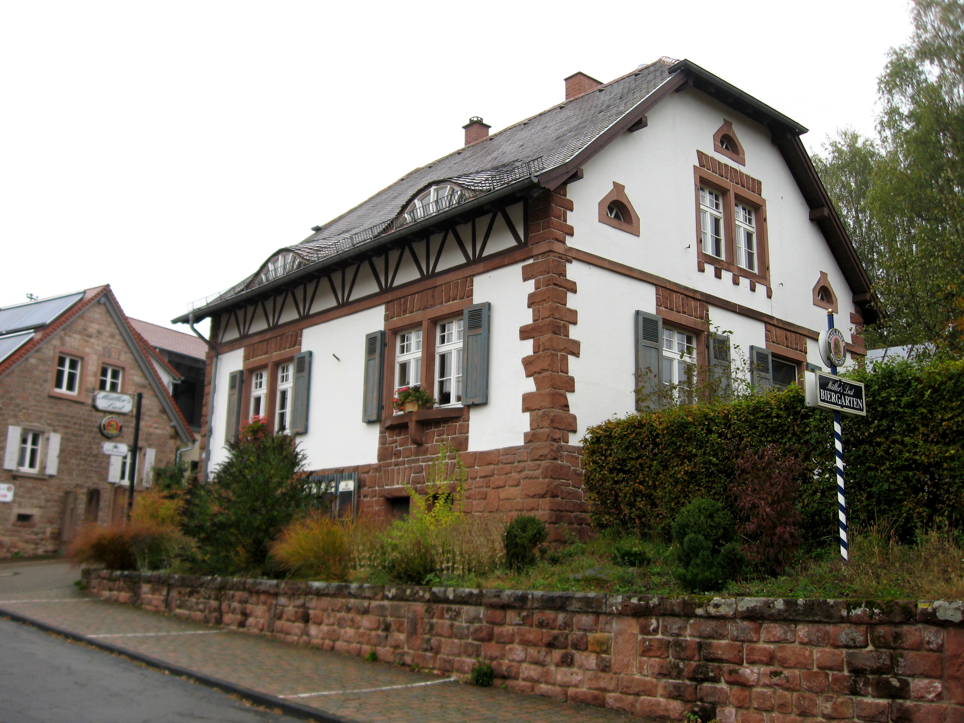 ehemaliges Forsthaus, Ortsstraße 12 in Hofstätten; eingeschossiger Krüppelwalmdachbau, Fachwerkkniestock, um 1910